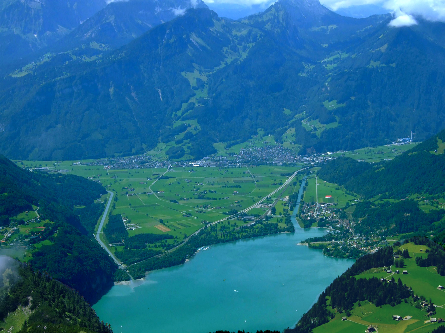 Sicht auf Amden, Weesen und die obere Linthebene vom Leistkamm aus